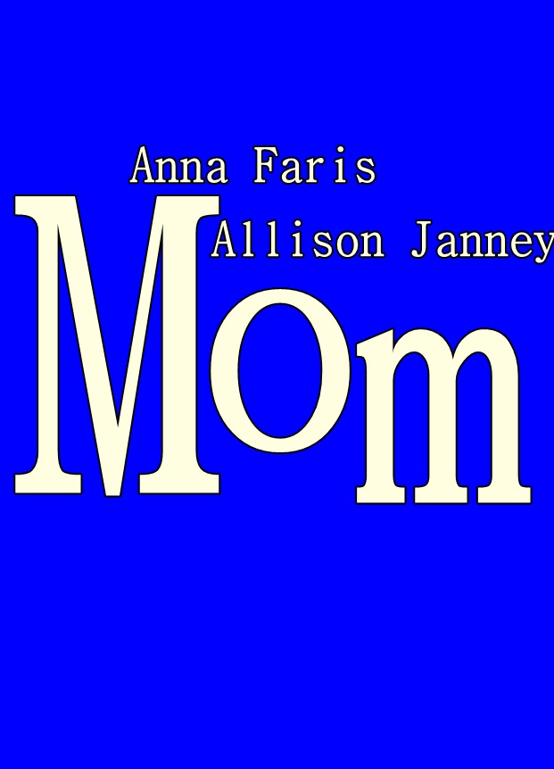 Mom (serie de televisión)